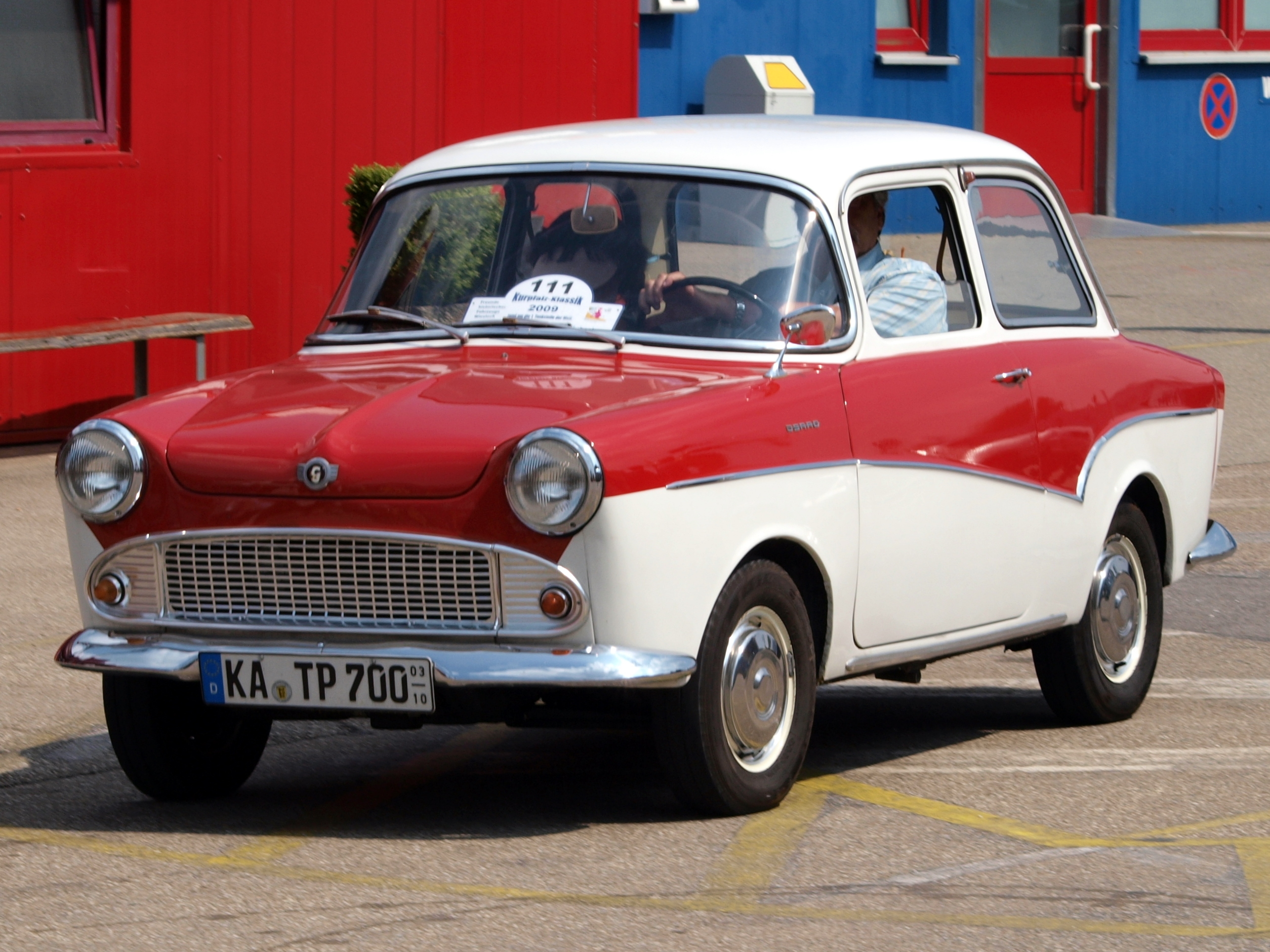 Photographed at the Technik museum Sinsheim, Germany. Participating in the Kurpfalz-Klassik rund um die 1. Tankstelle der Welt.